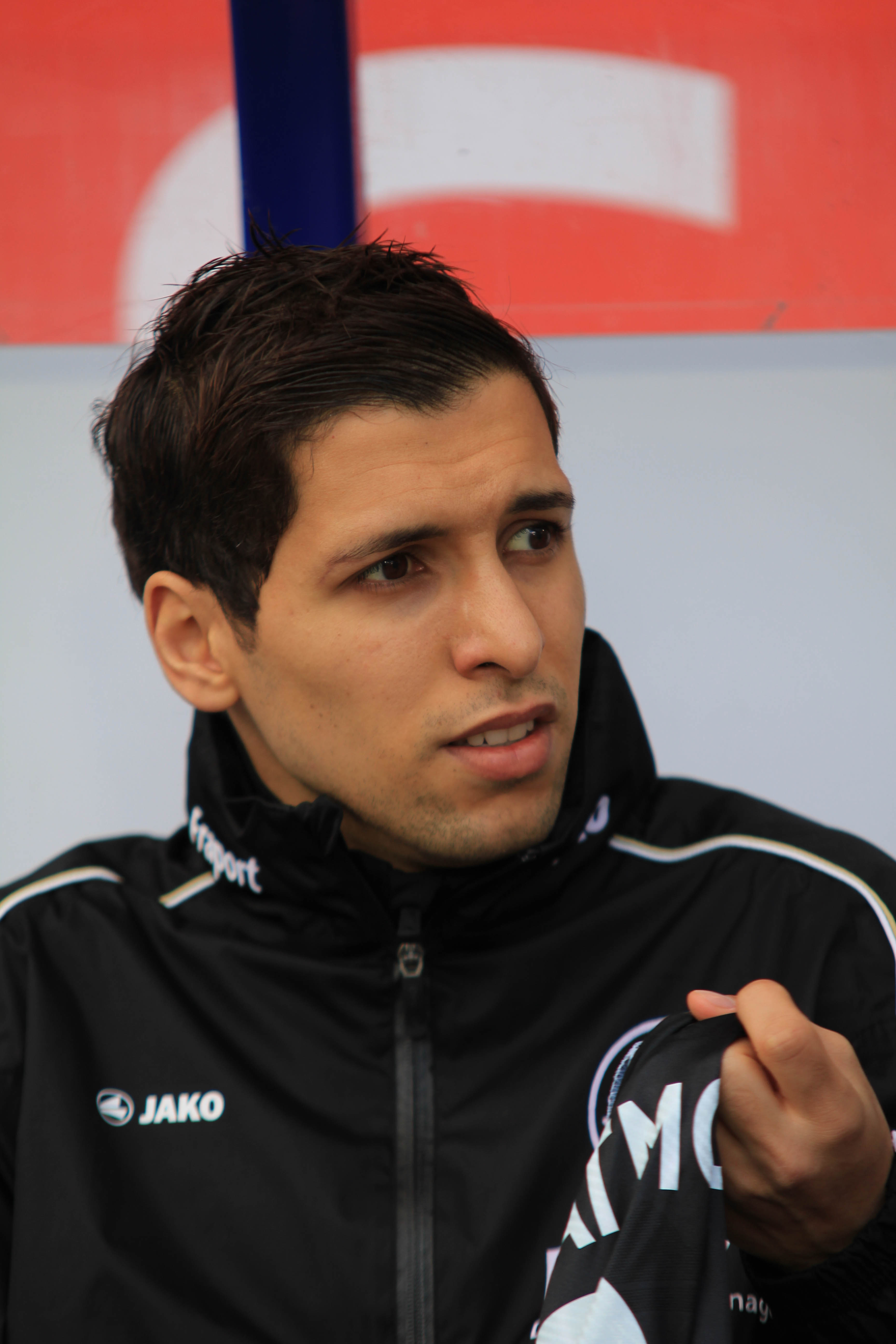 Algerian footballer Karim Matmour, Eintracht Frankfurt